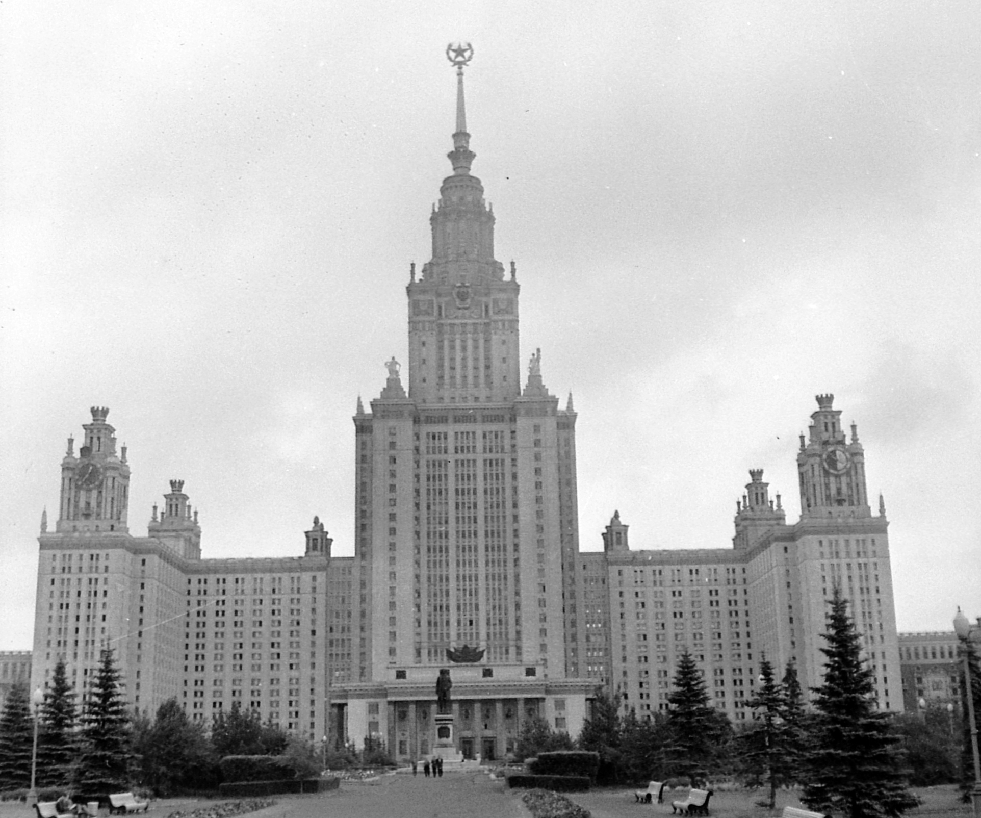 Lomonoszov Egyetem. Location: Russia, Moscow Tags: Soviet Union, Red Star, university Title: Lomonoszov Egyetem.